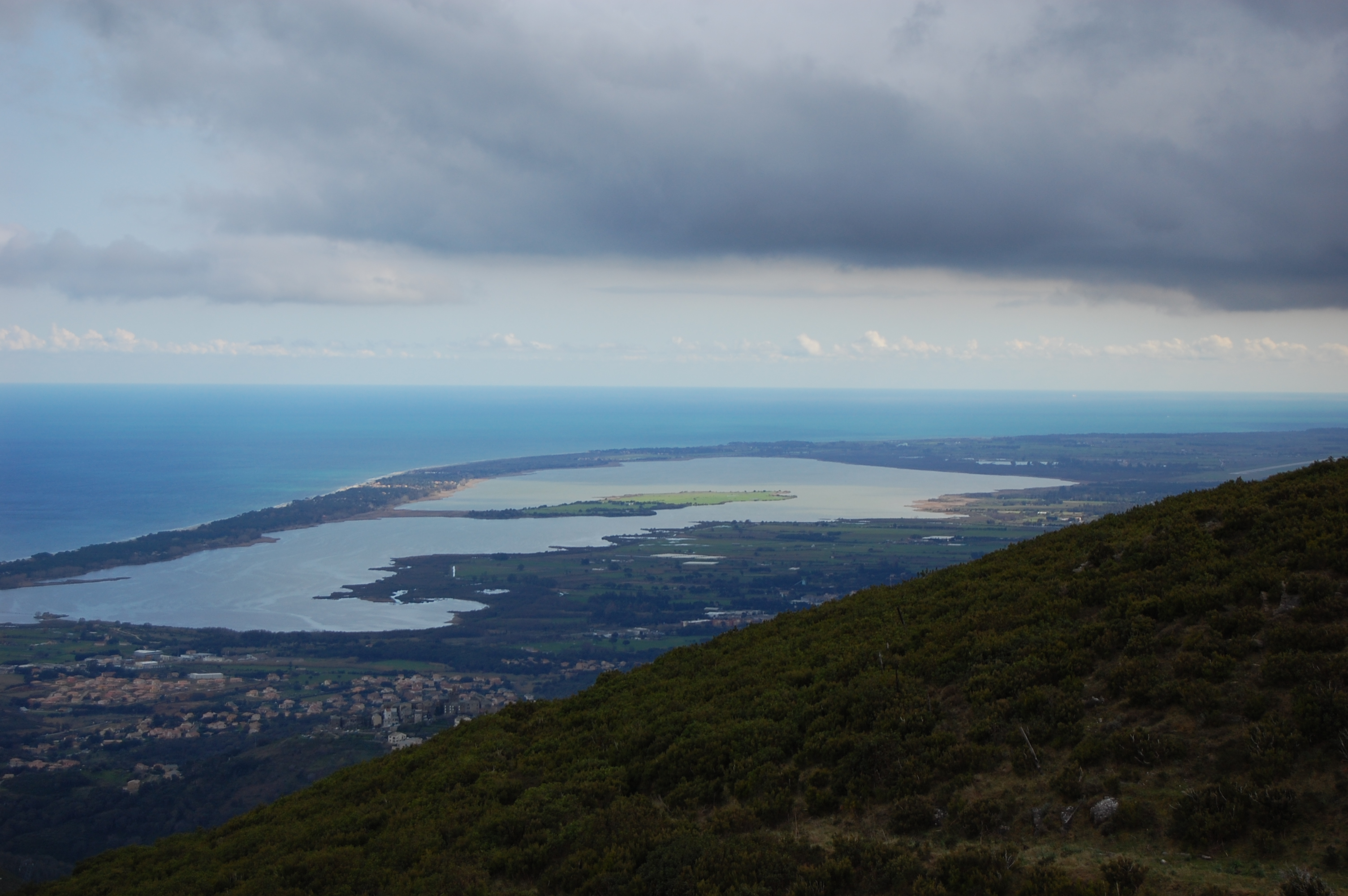 Etang de Biguglia